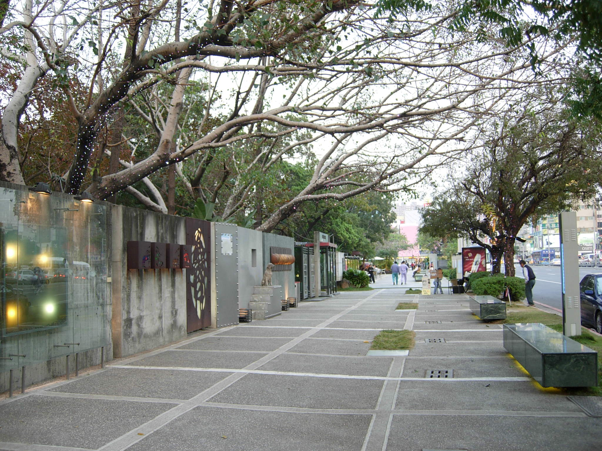 Urban Spotlight